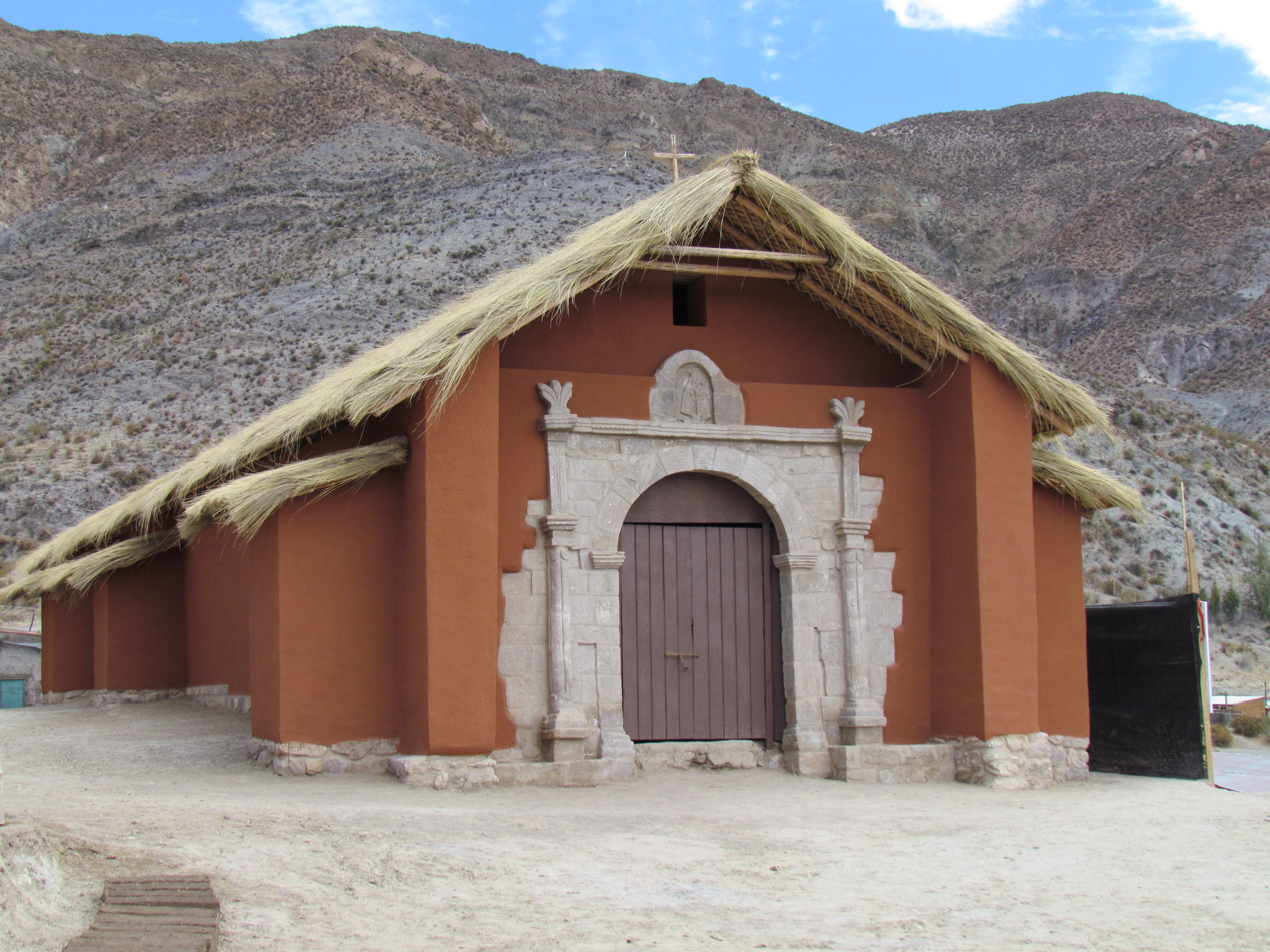 Templo de la Virgen de la Candelaria de Belén, Chile.